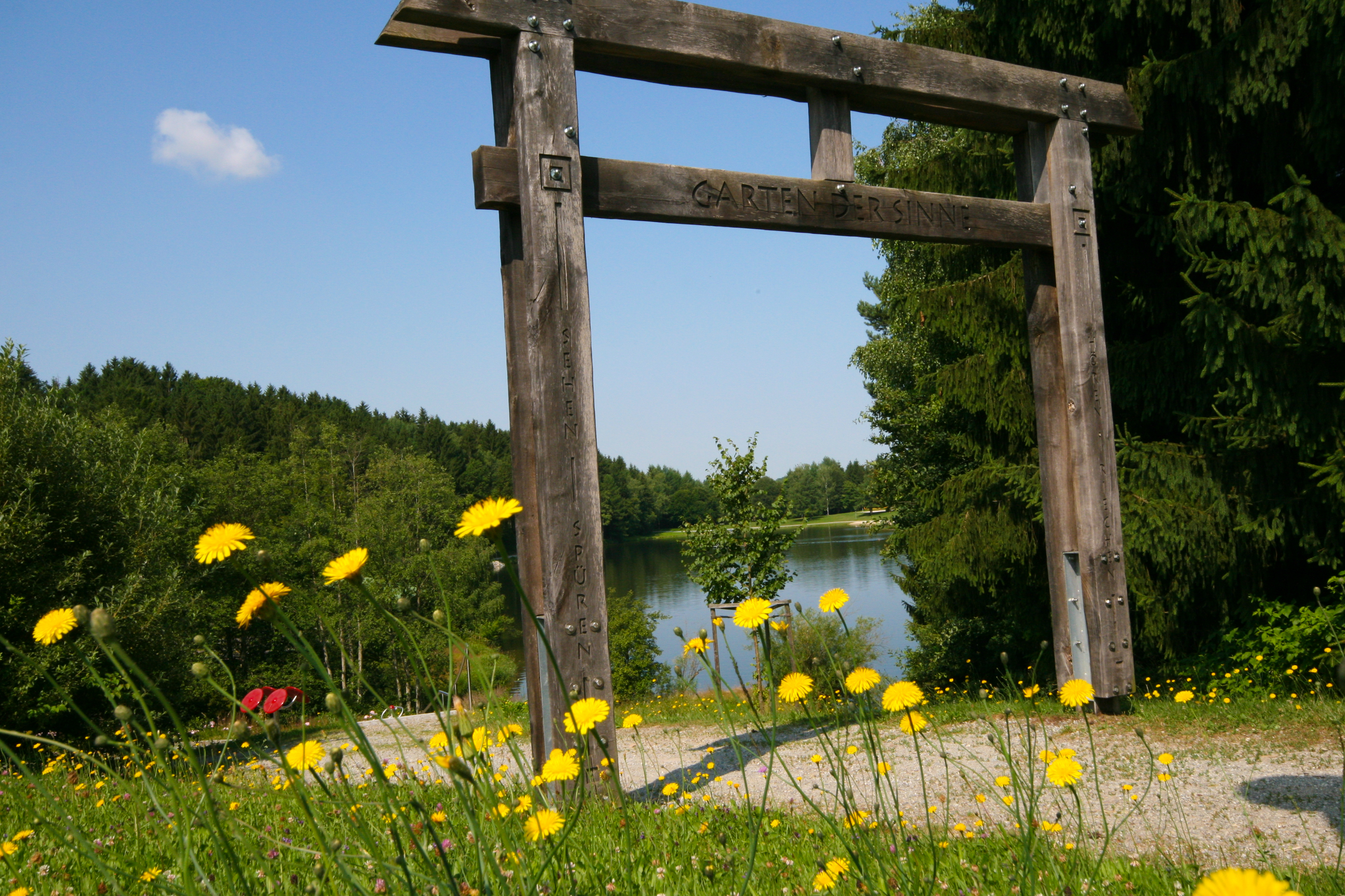 Eingang zum Garten der Sinne beim Eginger See